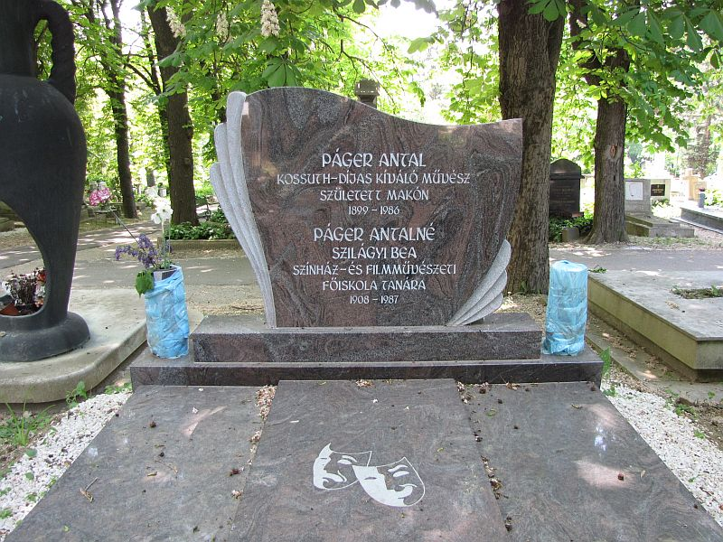 Páger Antal (Makó, 1899. január 29. – Budapest, 1986. december 14.) magyar színművész és feleségének Szilágyi Beának (1908-1987), a Színház- és Filmművészeti Főiskola tanárának végleges sírja Budapesten. Farkasréti temető: 25-1-84/85.